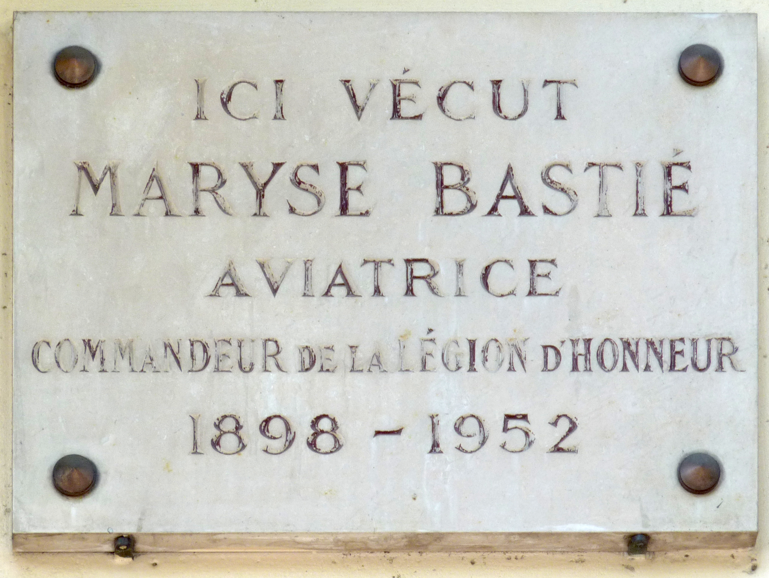 Plaque en mémoire de Maryse Bastié (1898-1952), aviatrice française, apposée sur la maison 23 rue Froidevaux, Paris 14e.